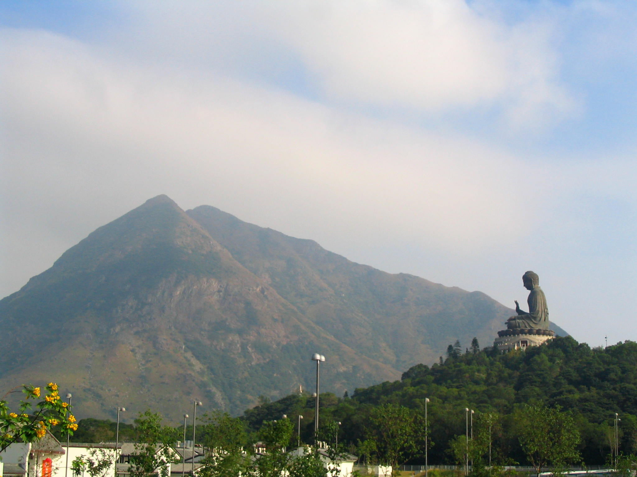 Lantau Peak, Hongkong